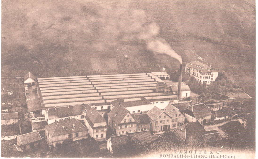 Usine Lamotte de Rombach-le-Franc (Alsace, France) dans les années 1930.